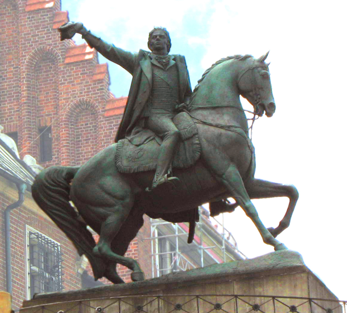 Kosciuszko Monument at Wawel in Kraków, Poland